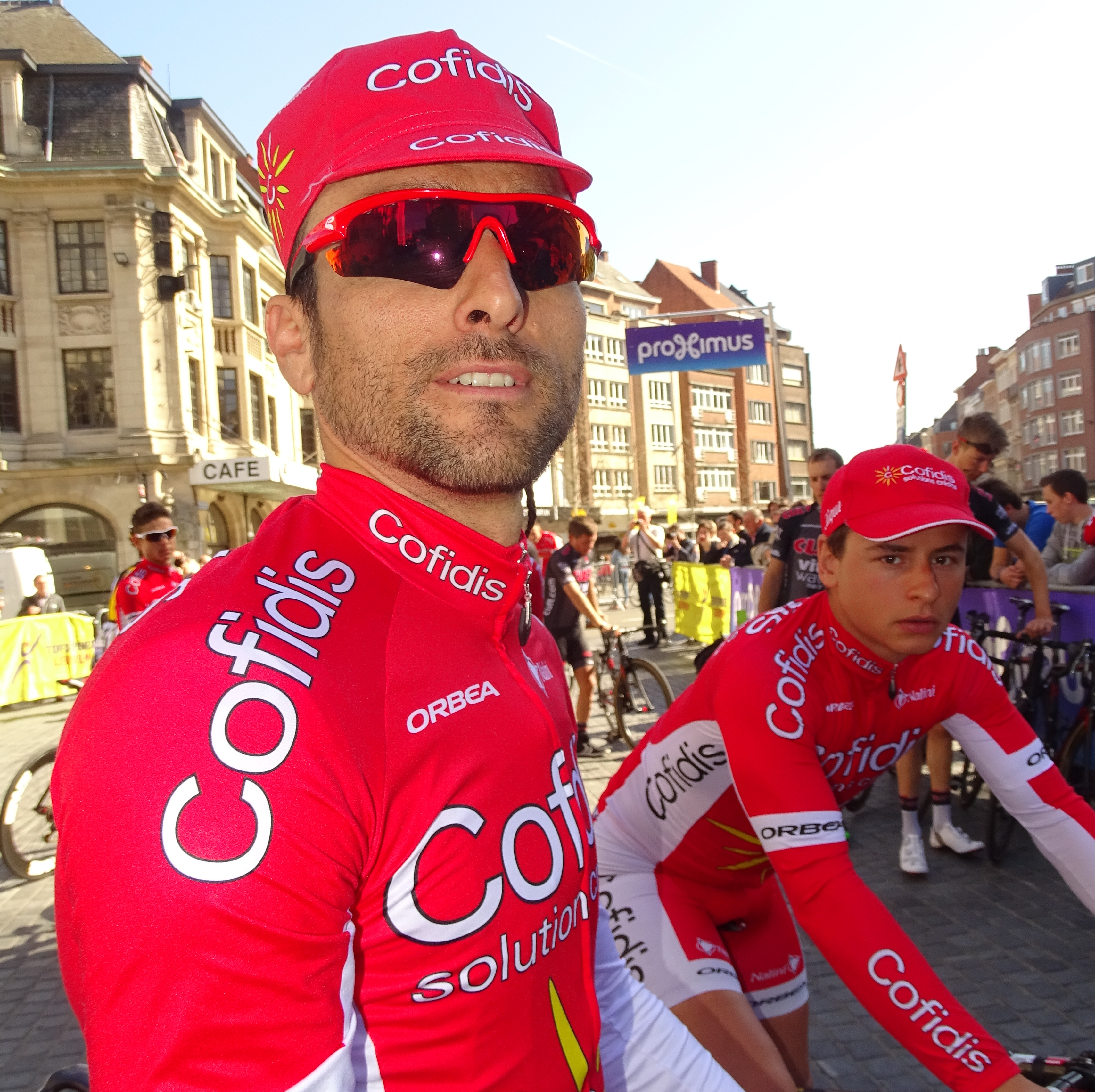 Reportage réalisé le mercredi 15 avril à l'occasion du départ de la Flèche brabançonne 2015 à Louvain, Belgique.